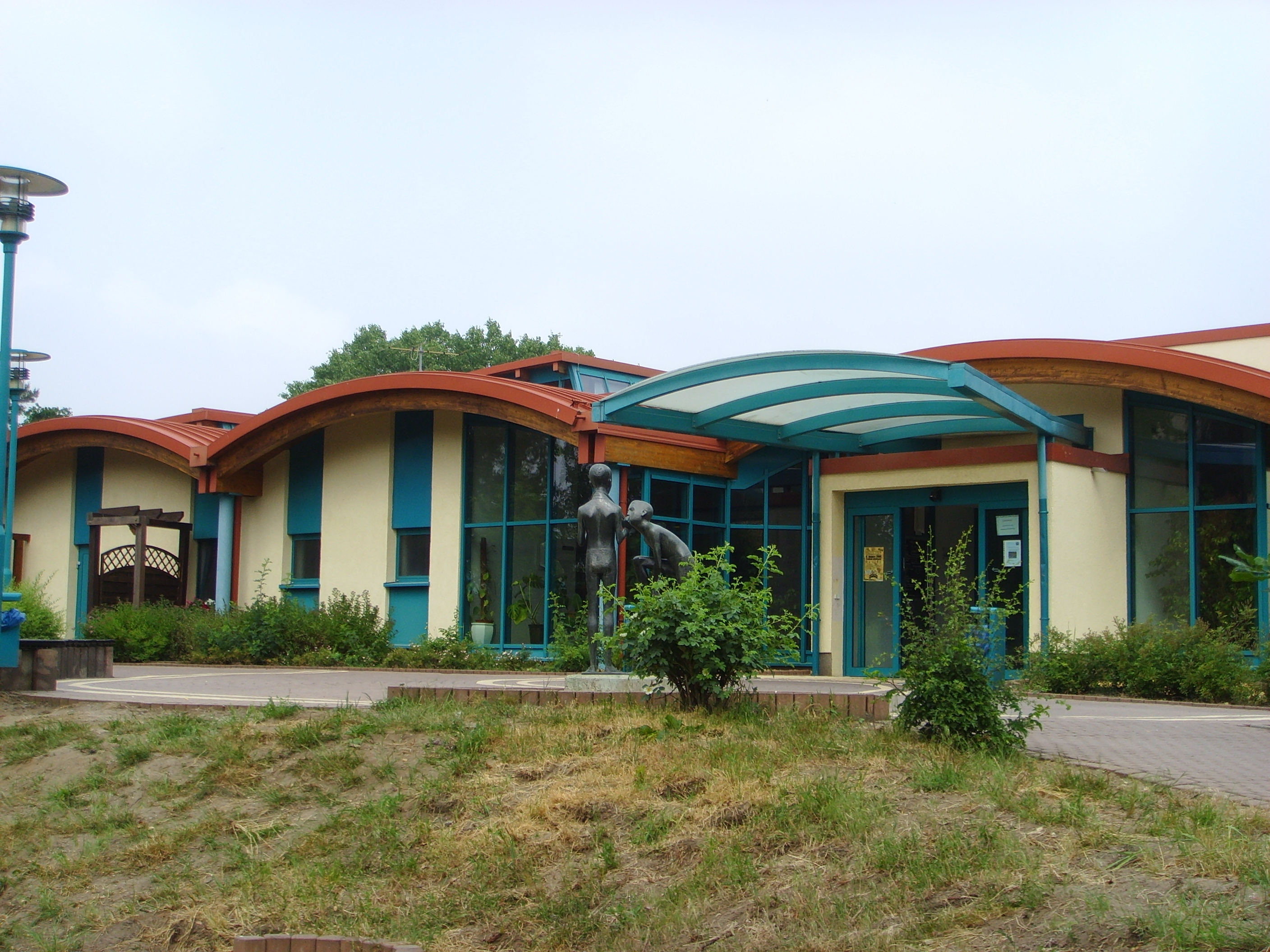 Eingang des Senftenberger Erlebnisbads, davor Plastik zwei badender Jungen von Ernst Sauer